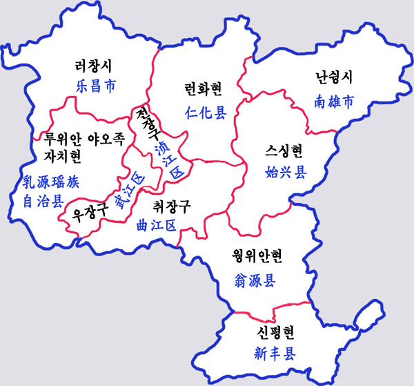 광둥성 사오관시 현급구역도